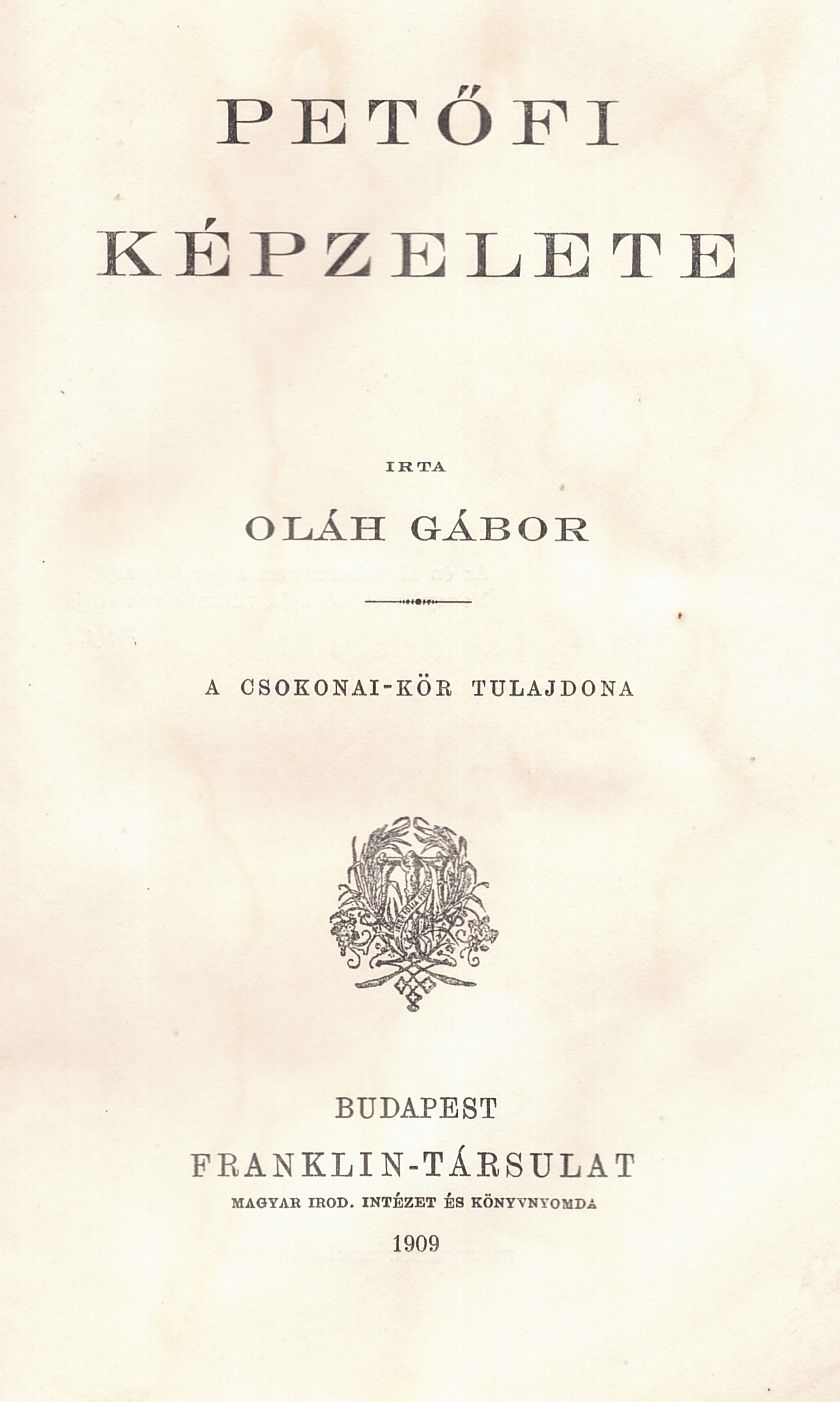 Oláh Gábor (1881-1942): Petőfi képzelete (1909)